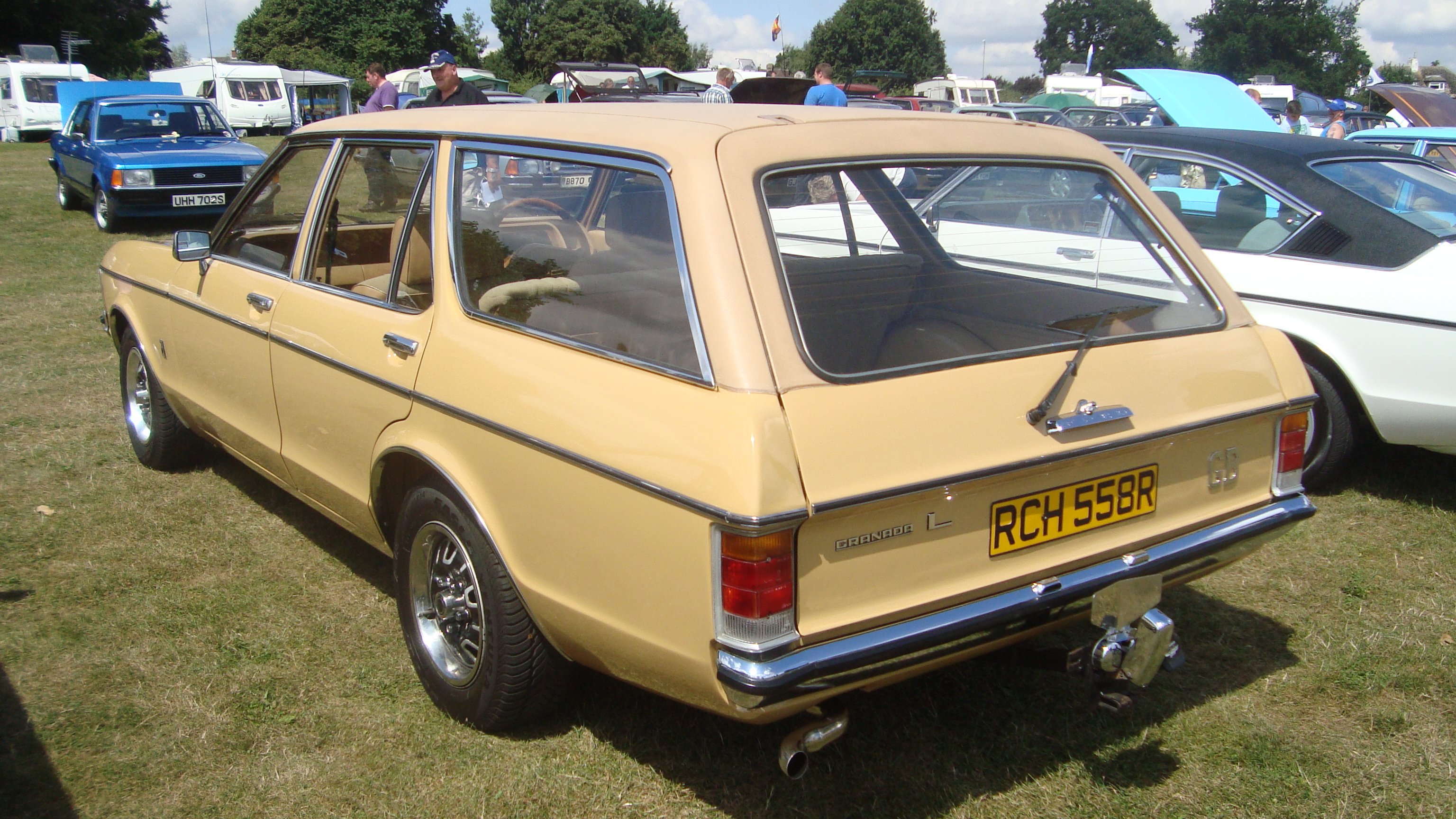 1976 Ford Granada L 2000 Estate